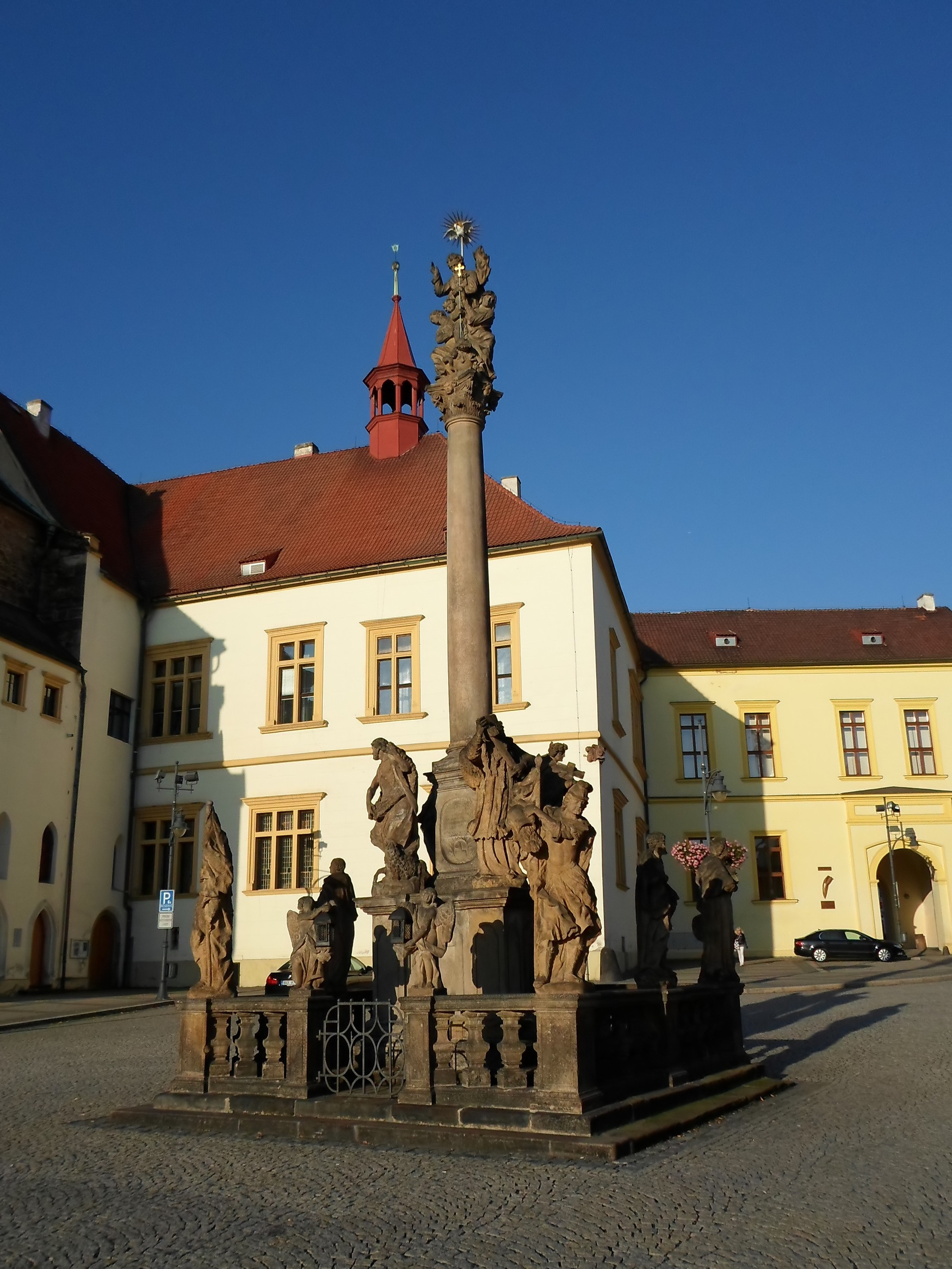 Sloup se sousoším Nejsvětější Trojice (Chomutov), 1. máje, Chomutov